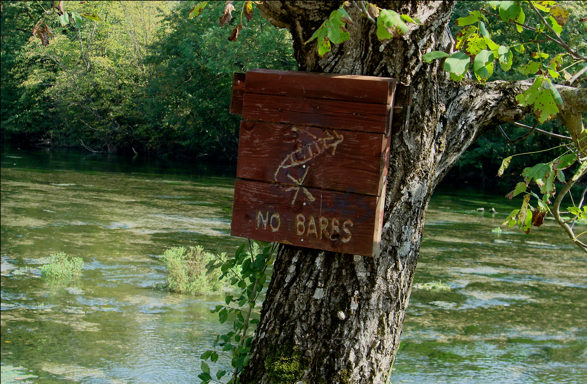 No Barbs